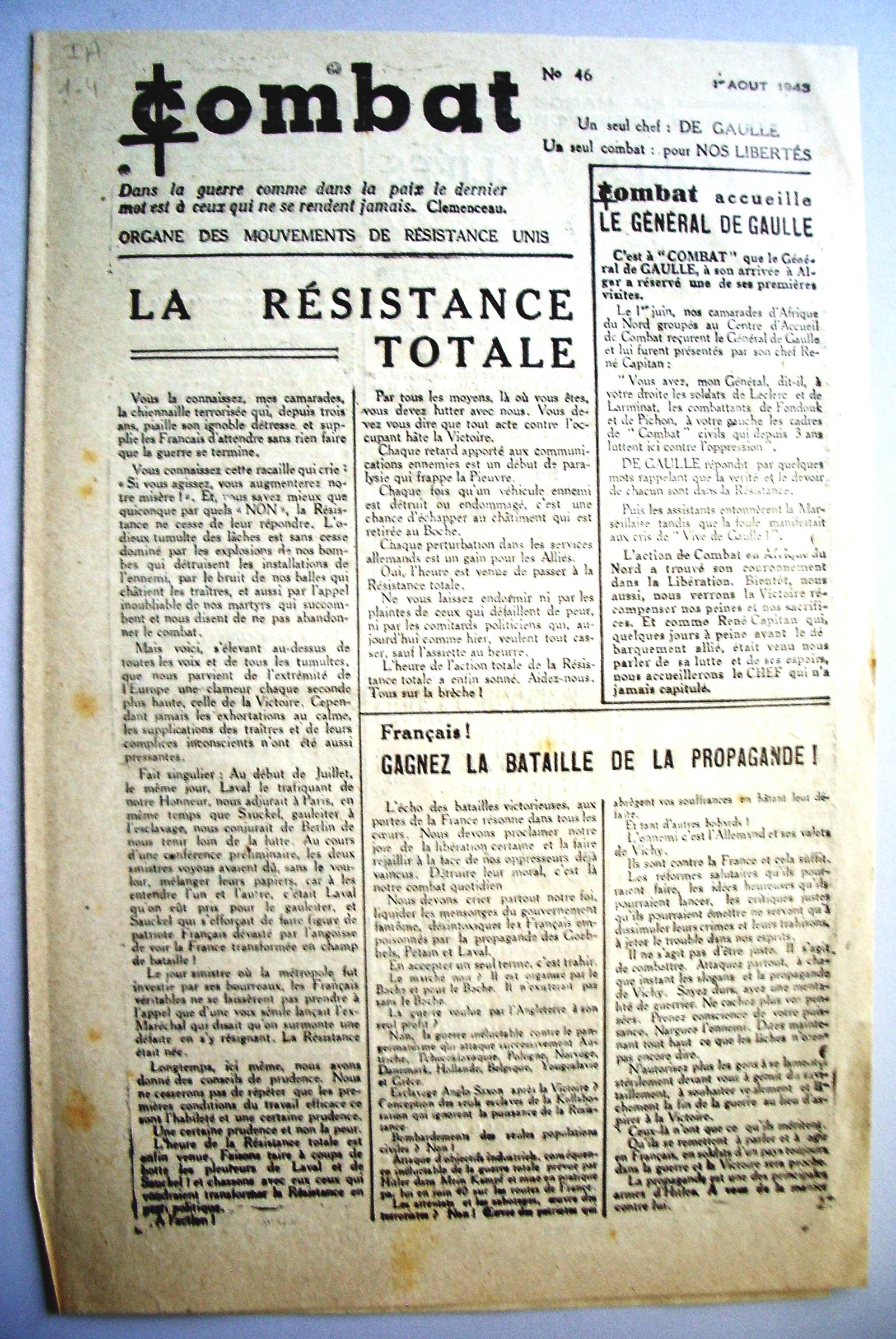 Journal clandestin imprimé à Nice sous l'occupation.